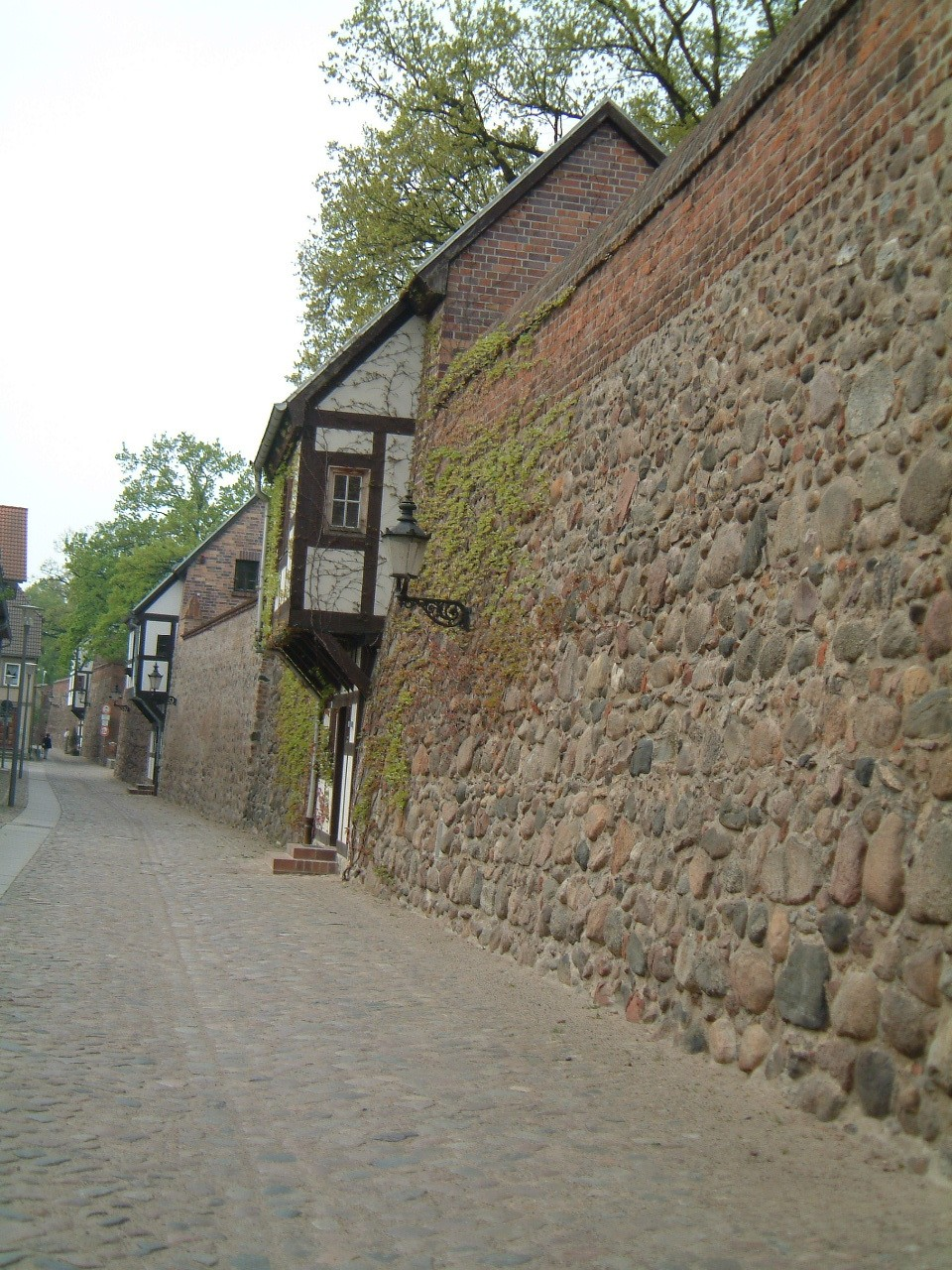 Neubrandenburger Stadtmauer mit Wiekhäusern